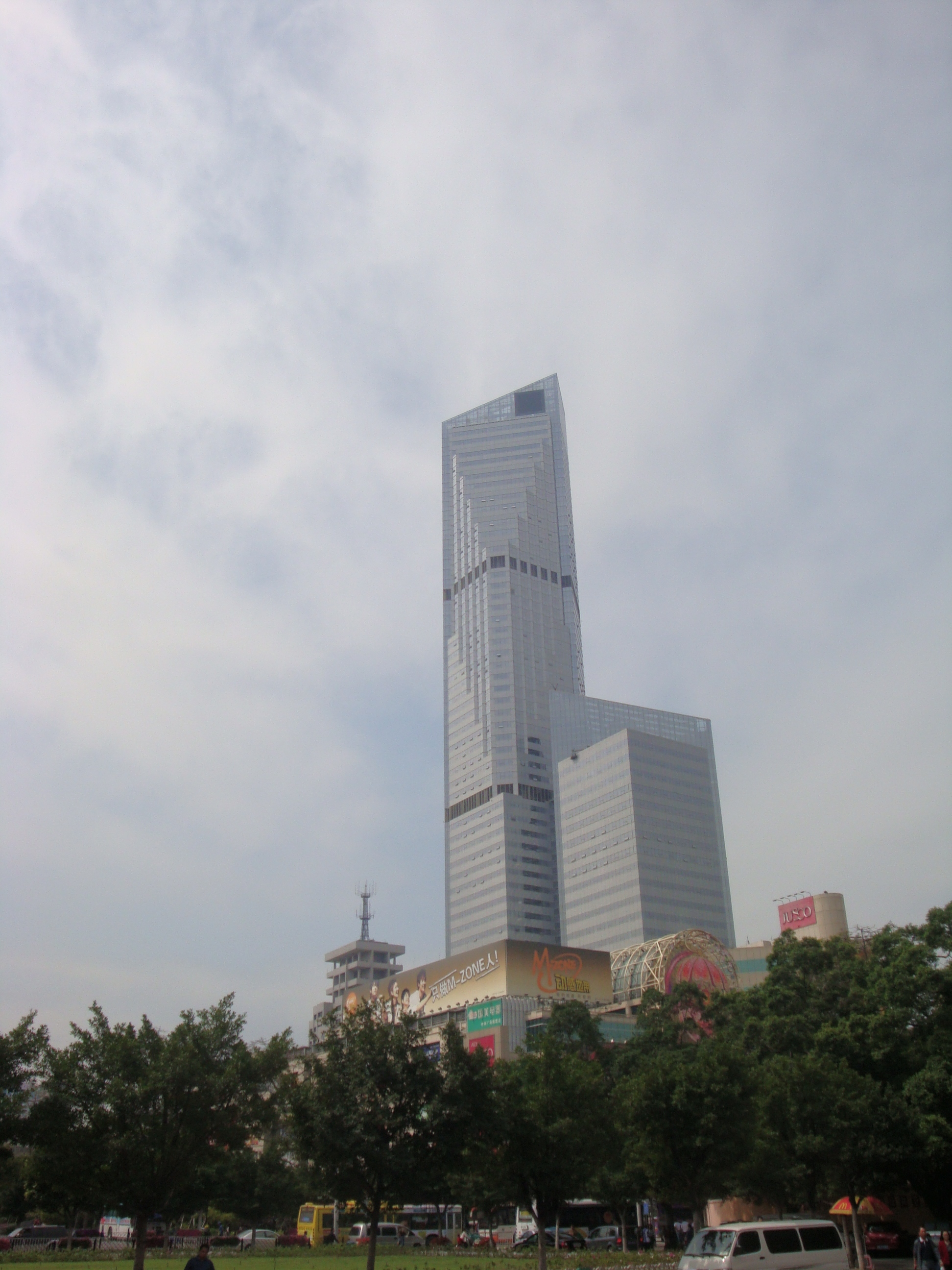 中文（中国大陆）: 广州中华国际中心